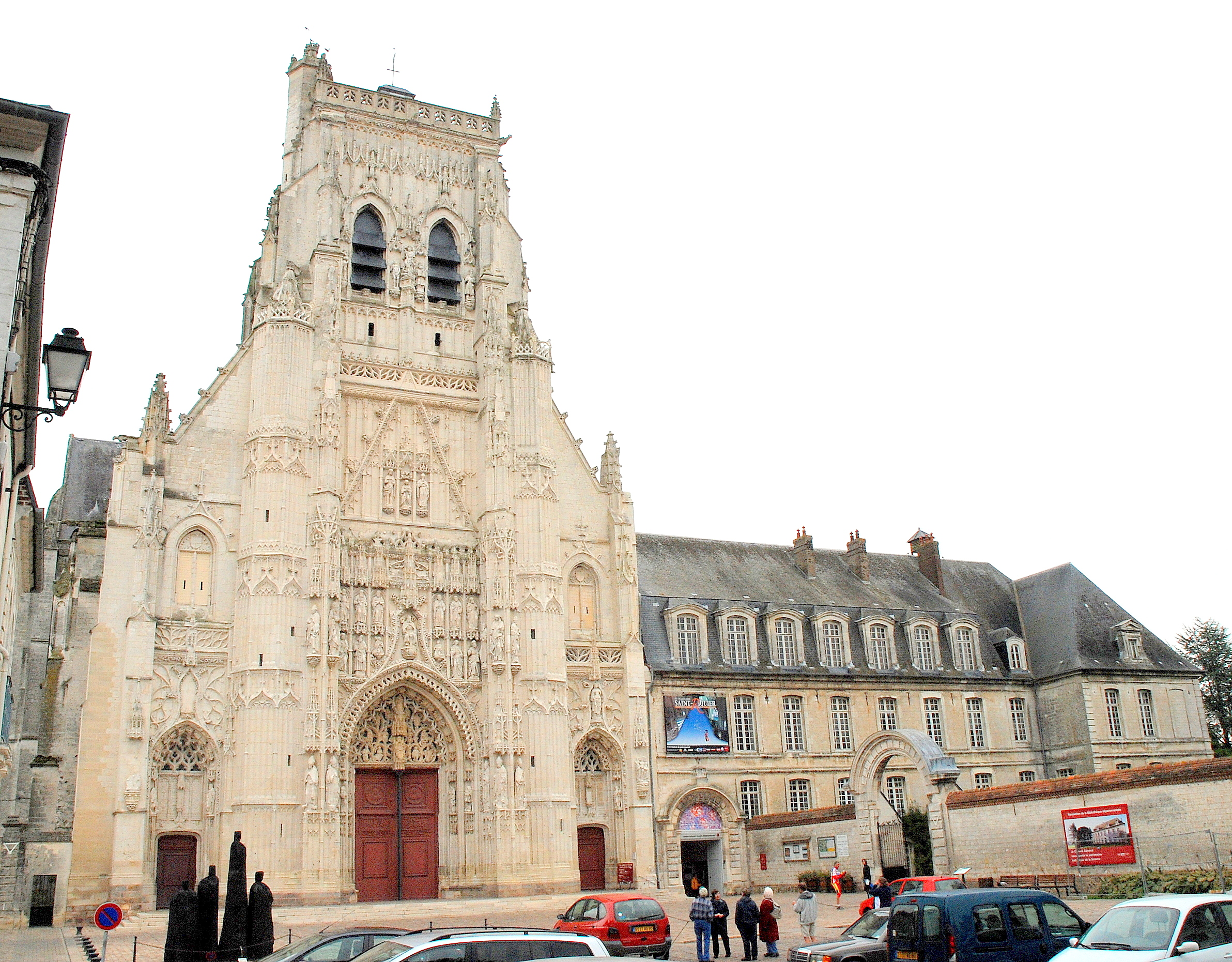 l'abbatiale à Saint-Riquier, France